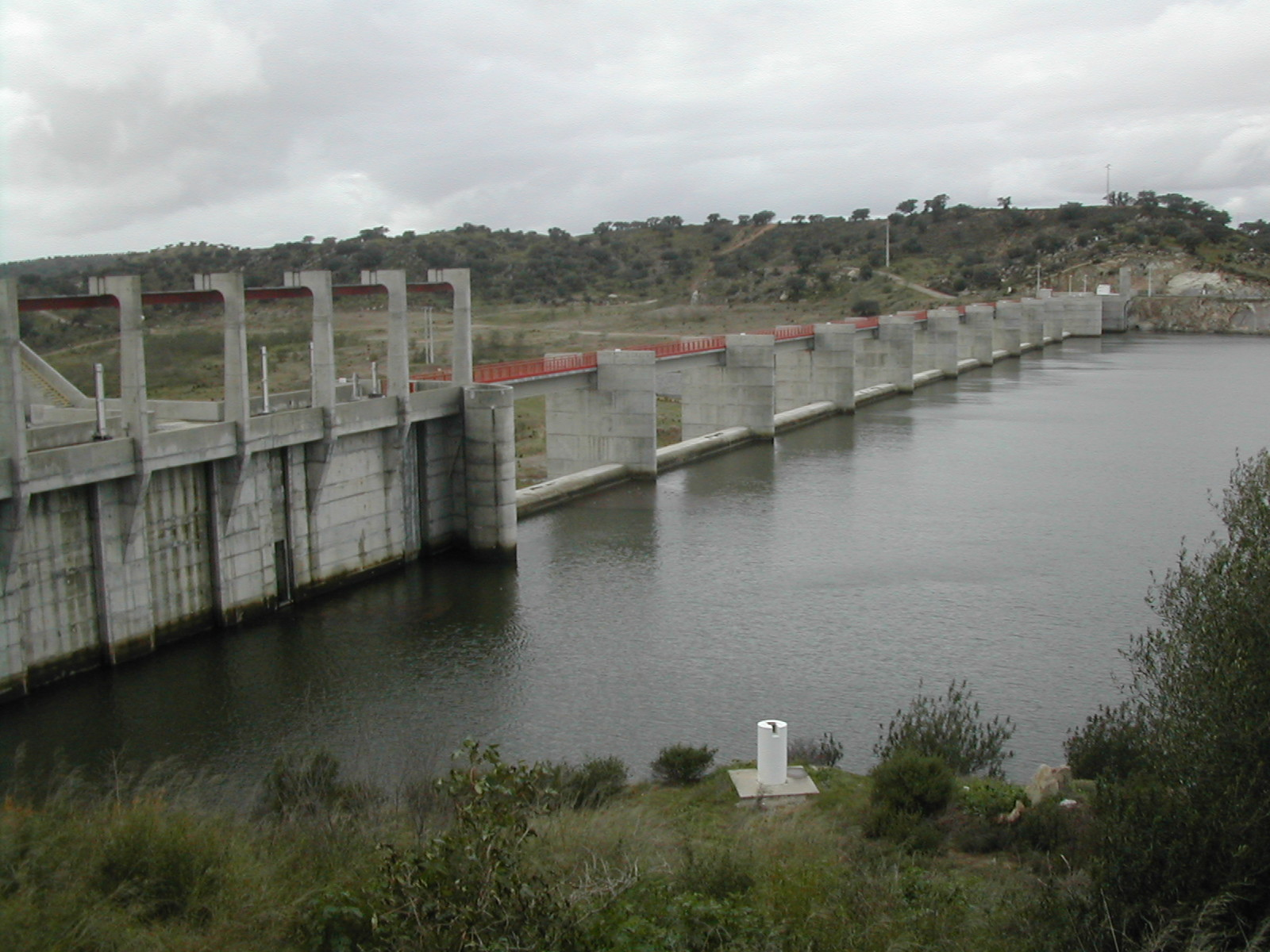 Albufeira e barragem de Pedrógão. Rio Guadiana. Alentejo. Portugal